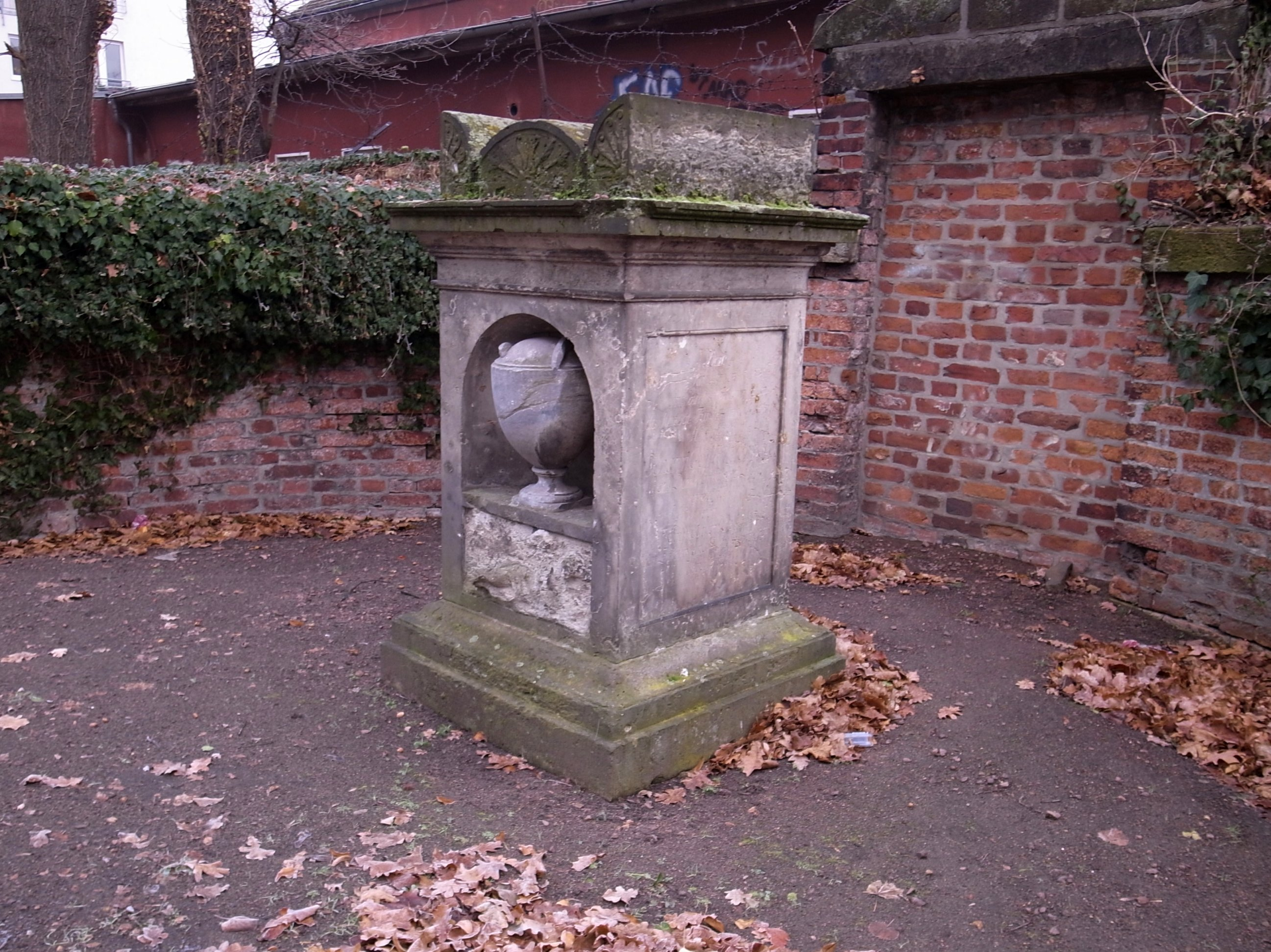 Johann Gottlob Schwabe,Ruhestätte auf dem Neuen Begräbnisplatz Dessau.Arzt, Herzogl. Fürstl. Anhaltischer Hofrath, *18.09.1749 ; †29.06.1809